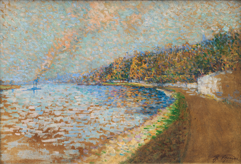 An der Elbe. Öl auf Karton, 25 x 35,5 cm, signiert B. Schrader, verso bezeichnet: "Dresdner Kunstgenossenschaft Weihnachtsfeier 29. Dez. 1910, gem. von Bertha Schrader".